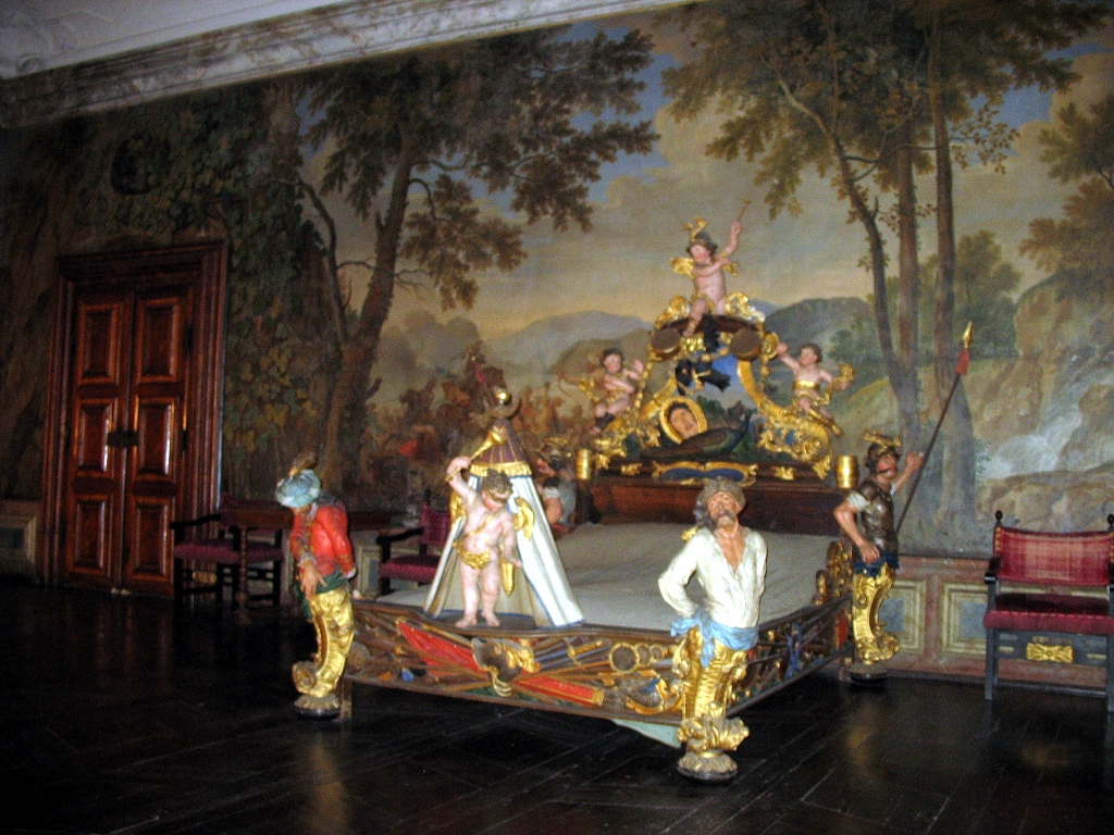 Stift St. Florian, Oberösterreich: Bett des Prinzen Eugen